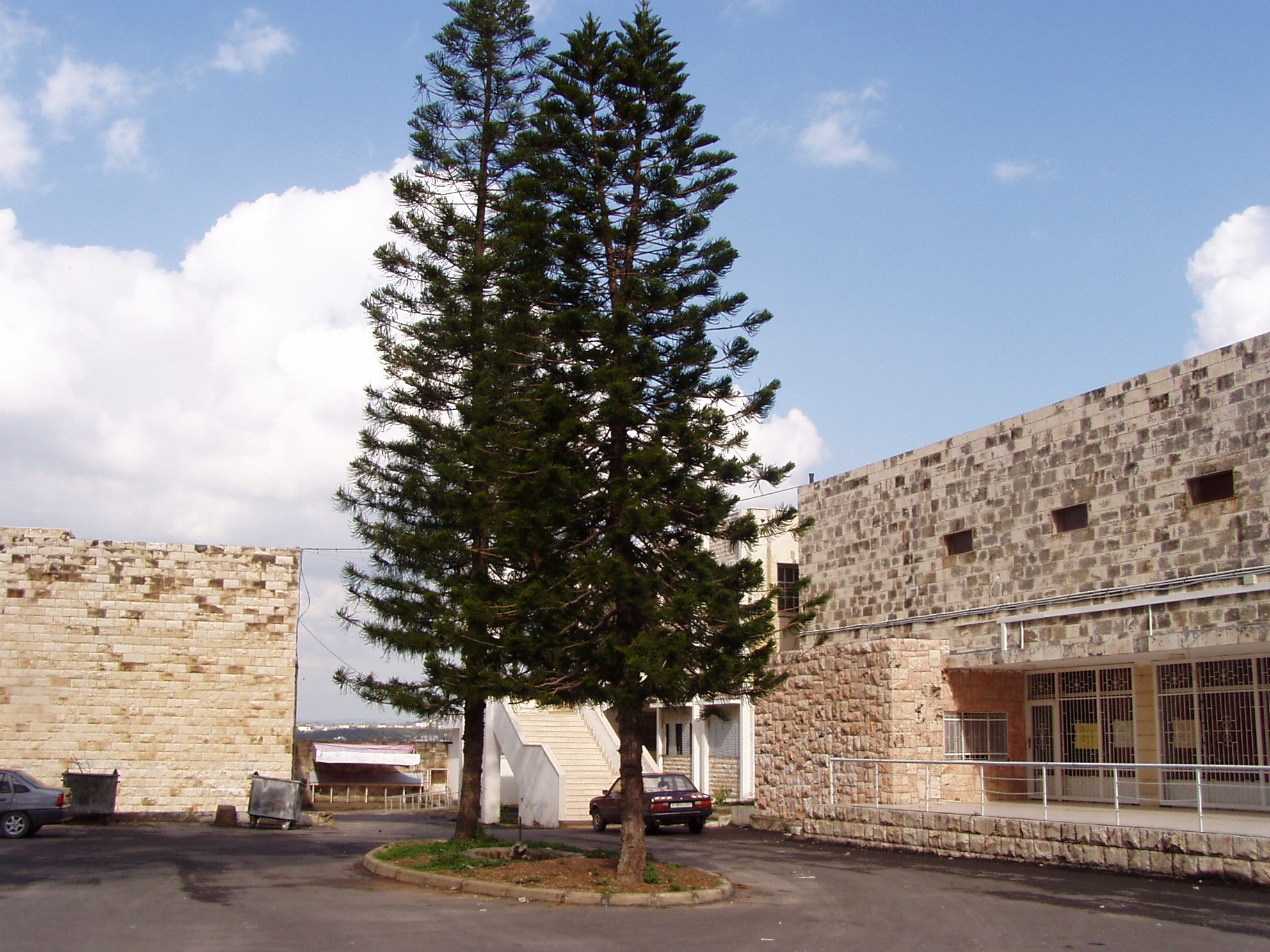 Tulkarm, Al-Adawiah High School